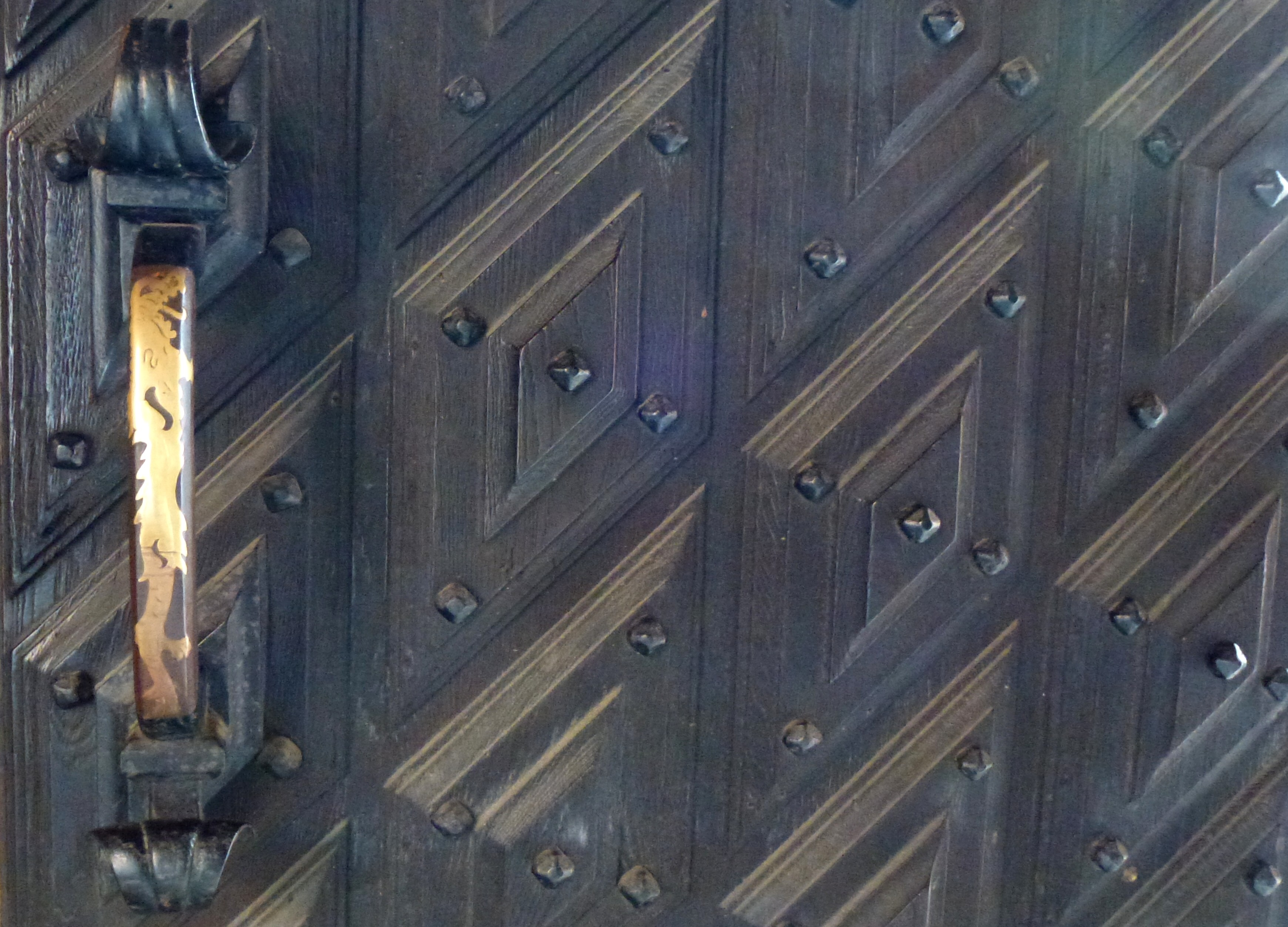 Huvudportal, detalj